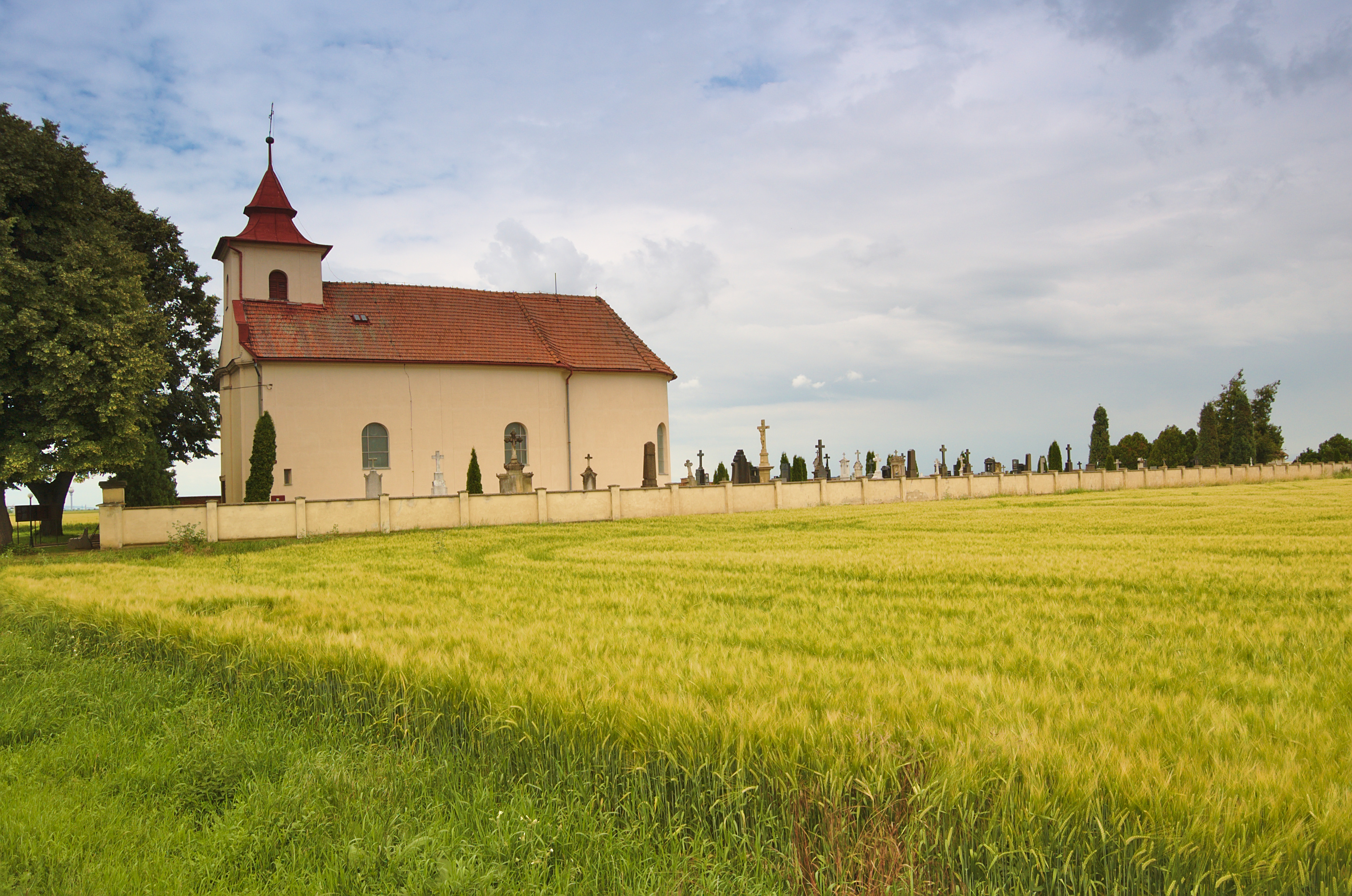 Kostel svatého Urbana, Hrubčice, okres Prostějov